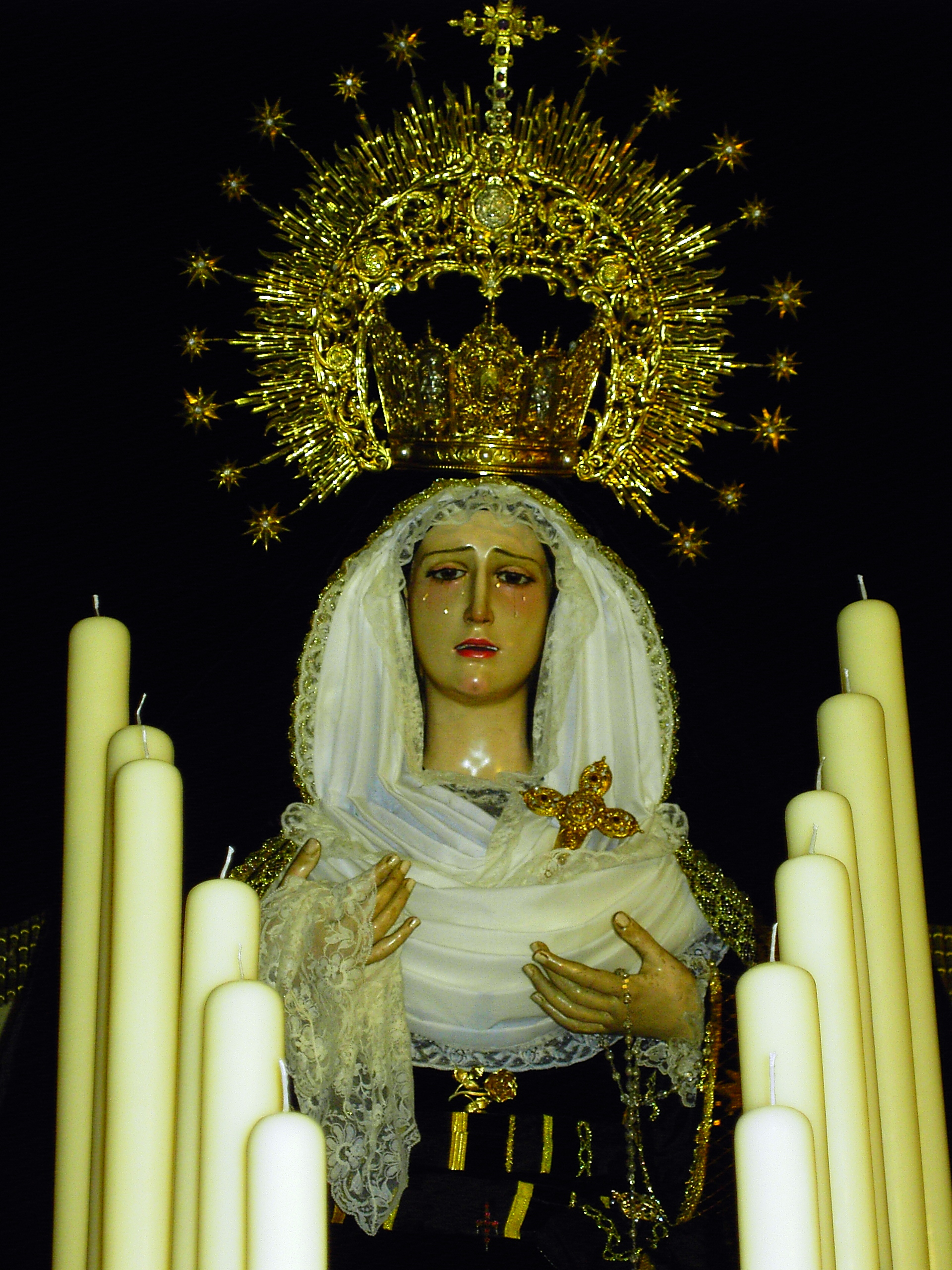 Virgen de la Soledad. Huelva.